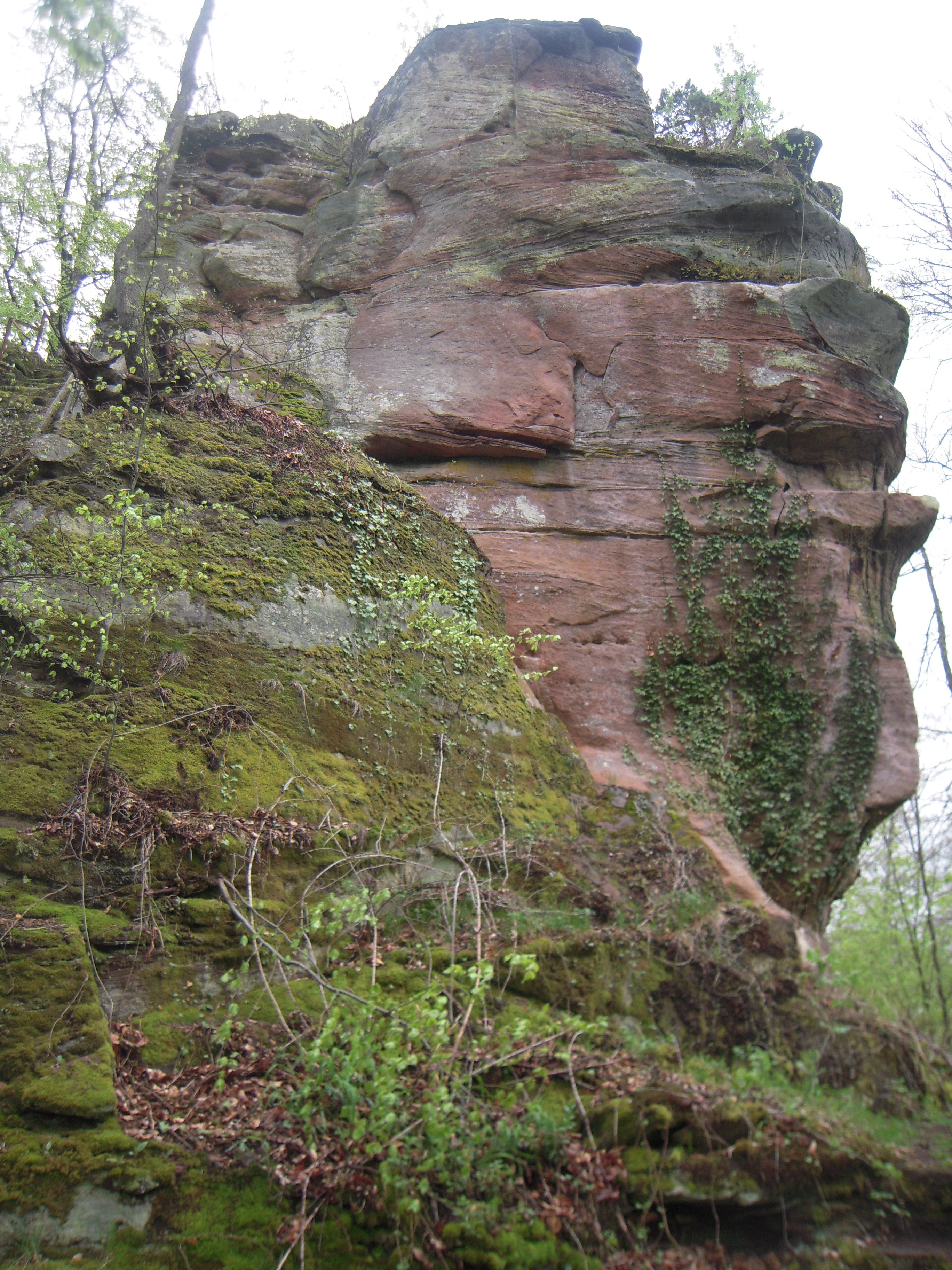 Ruine du Helfenstein (Falkenstein)